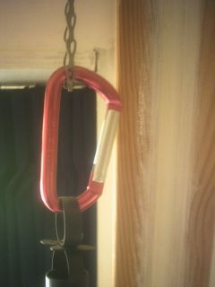 Een karabijnhaak